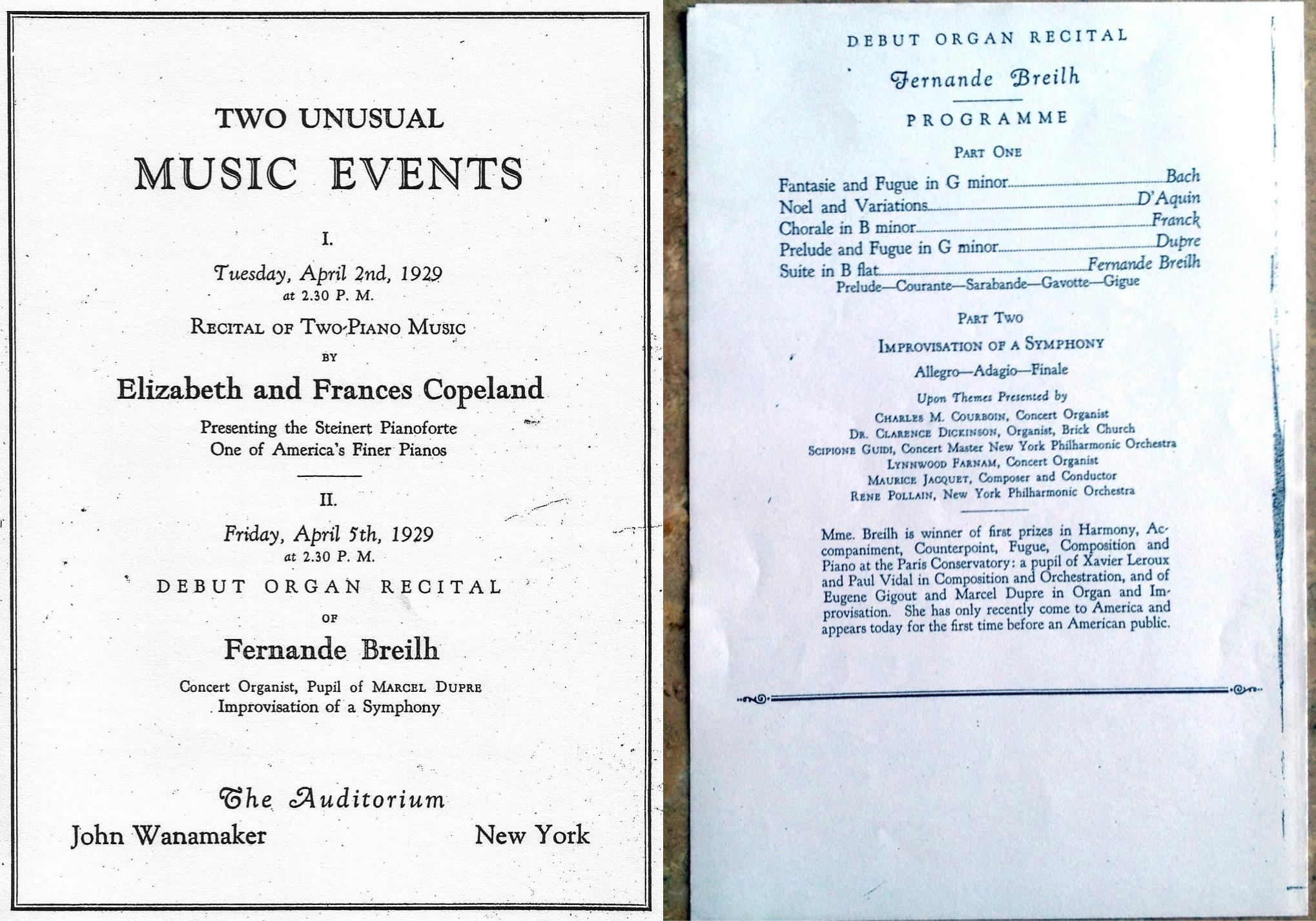 Programa del recital al Wanamaker Auditorium